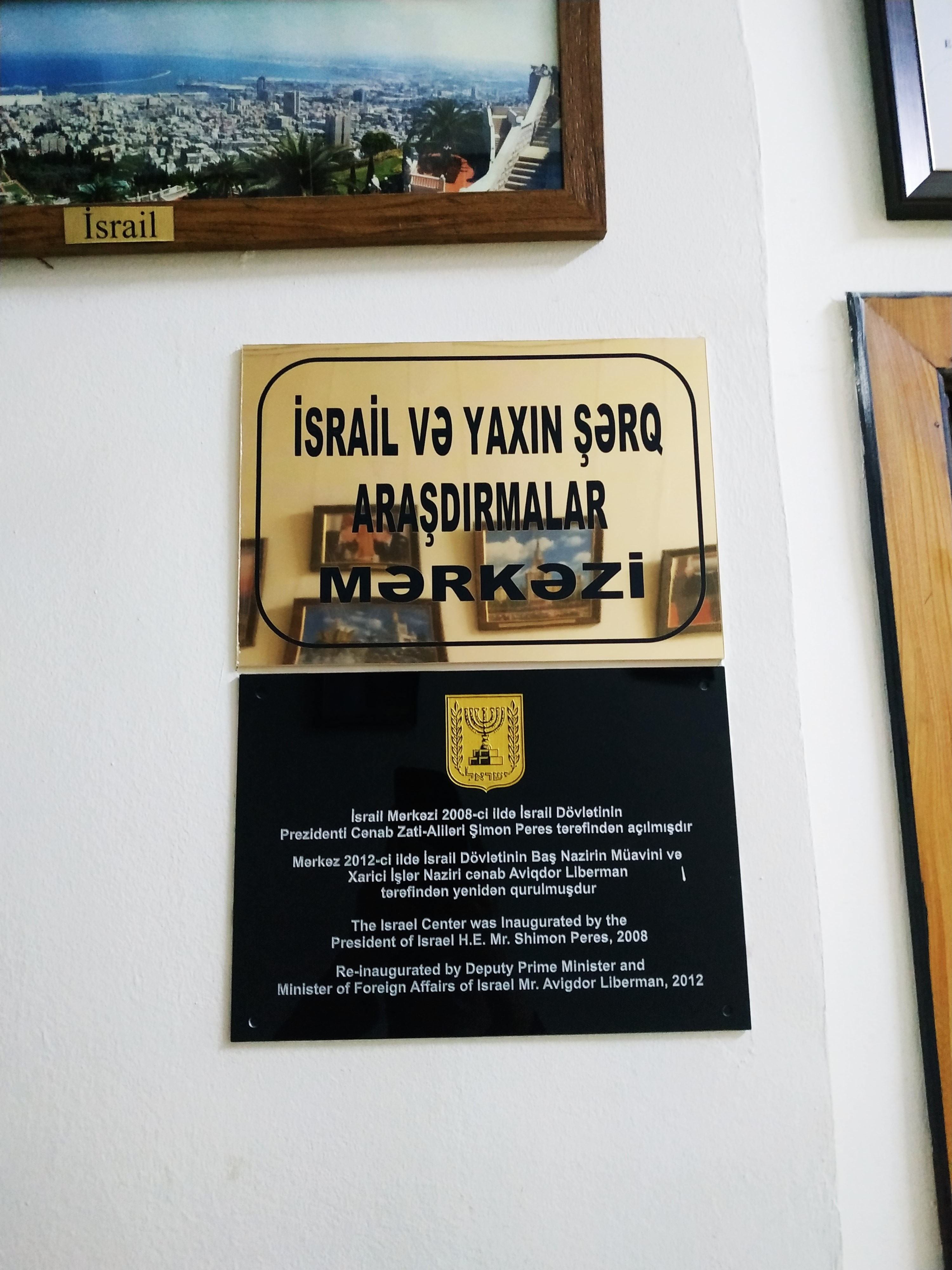 Le centre d'Israël (l'Université des langues d'Azerbaïdjan)